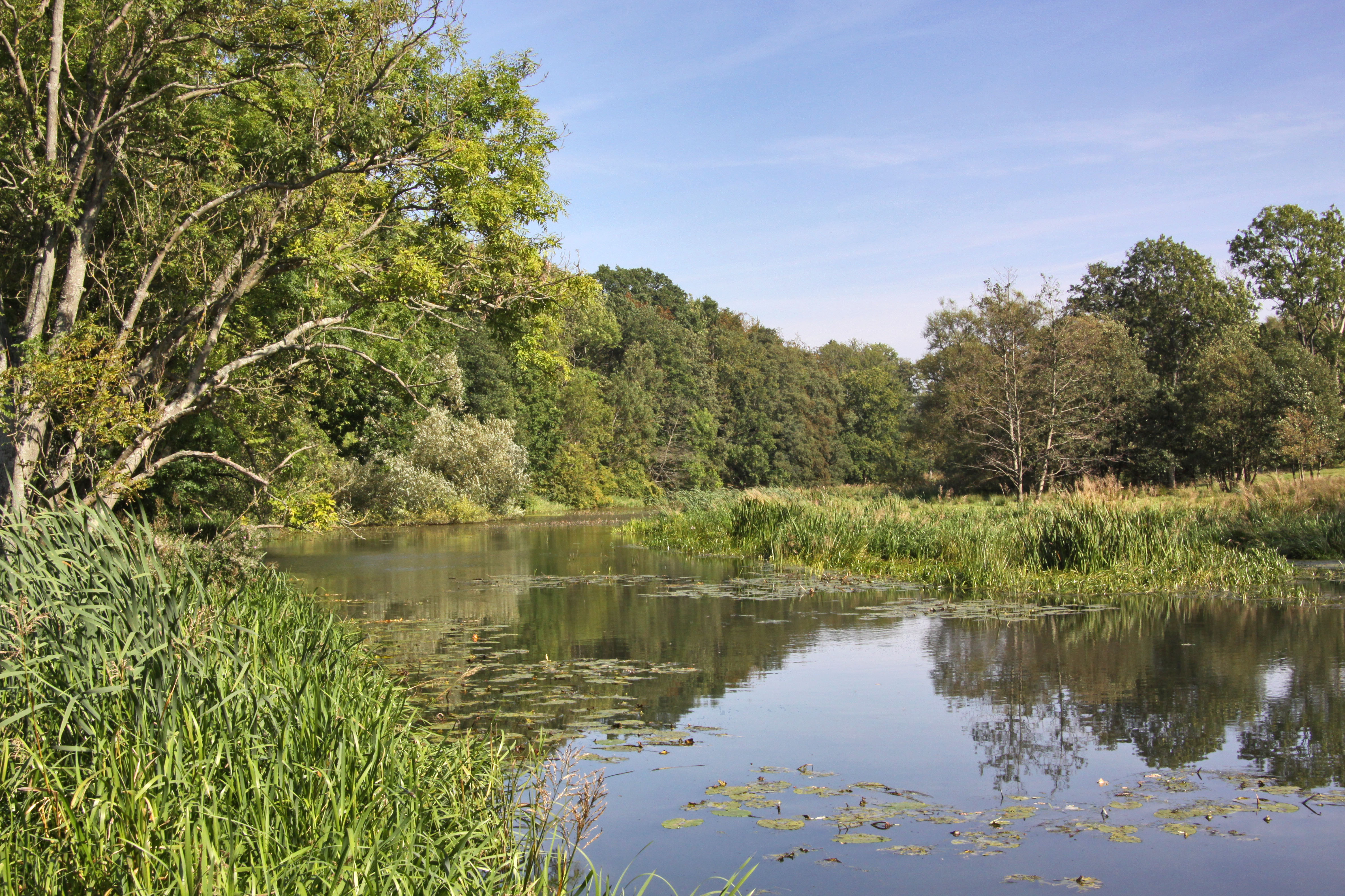 Helsingborg. Råådalen.